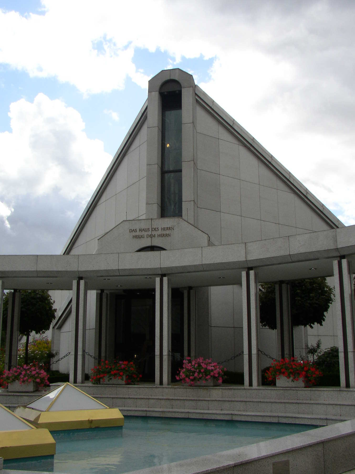 Description: Eingang des Frankfurt Tempels in Friedrichsdorf. Source: Photographiert von Donny Wöllauer Date: 26. August 2005